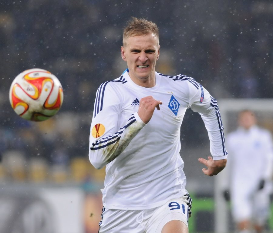 Łukasz Teodorczyk podczas gry w barwach Dynama Kijów w meczu Ligi Europejskiej w 2015 roku